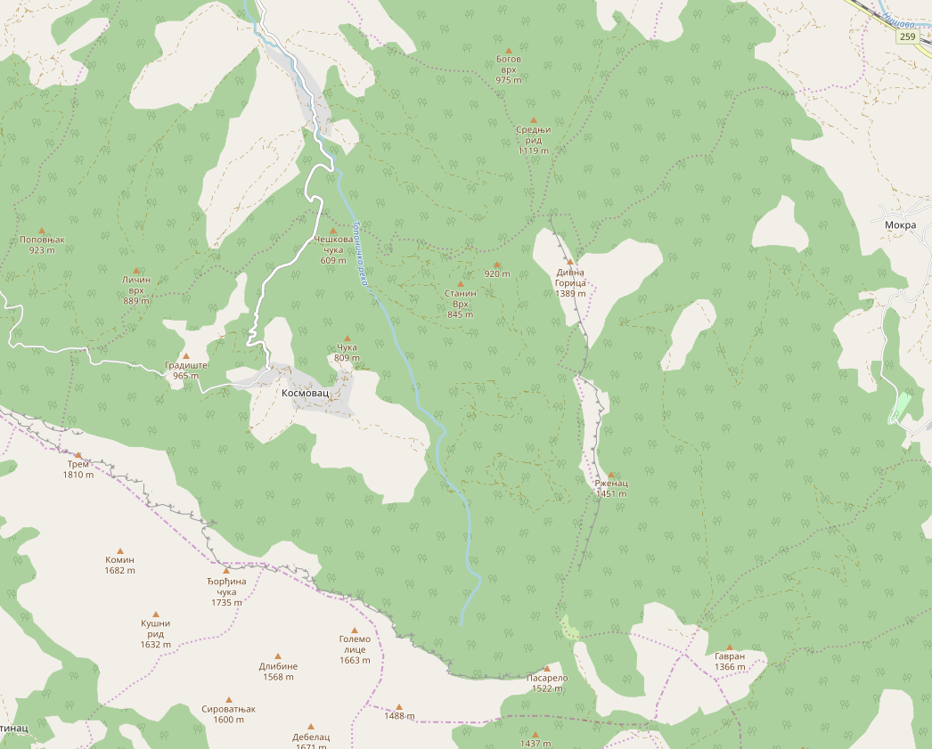 Srpski (latinica): Divna Gorica (Suva planina)